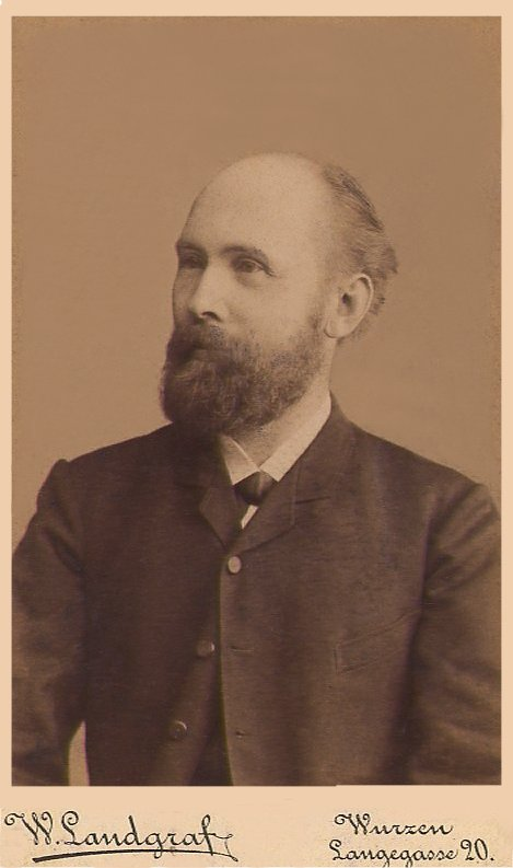 Photographie des Dr. Carl Hermann Steuding, hergestellt im Atelier des Wilhelm Landgraf, Wurzen, Langegasse 20